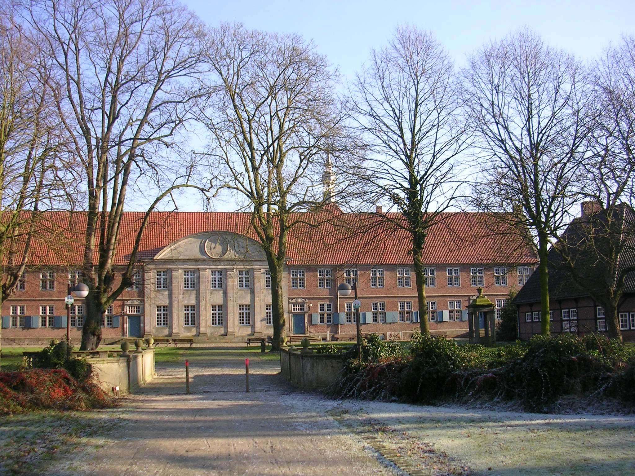 Frontansicht Klostergebäude Frenswegen, Nordhorn, Niedersachsen, Deutschland